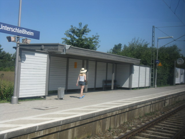 S-Bahnhof Unterschleissheim (S-Bahn station, Unterschleissheim)